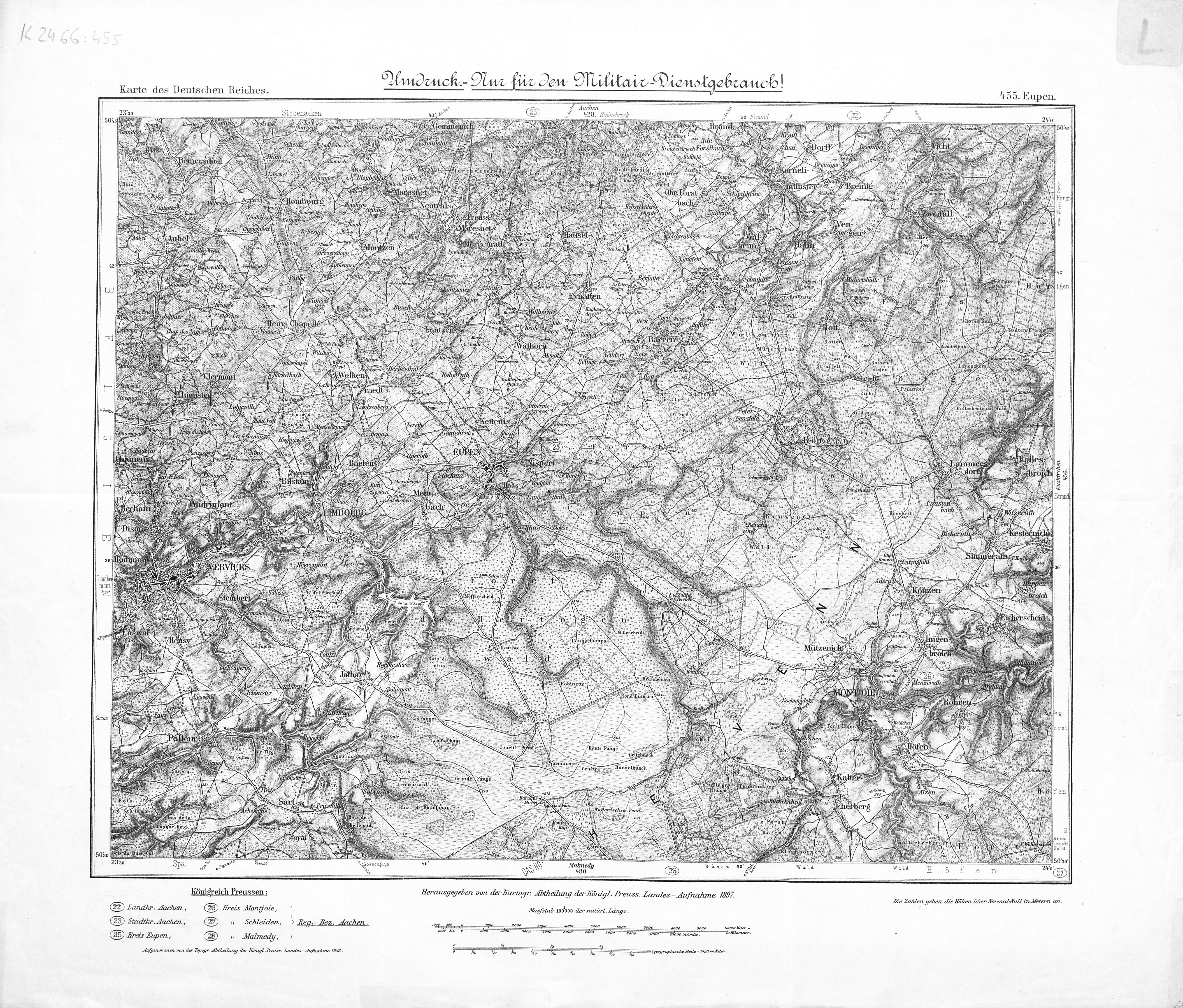 In: Karte des Deutschen Reiches/ hrsg. von der Kartogr. Abtheilung der Königl. Preuss. Landes-Aufnahme. Berlin, 1890. 1897; [Electronic ed.] Koblenz : Landesbibliothekszentrum Rheinland-Pfalz, 2010.